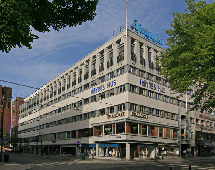 Høyres hus, Stortingsgata 20, Oslo.